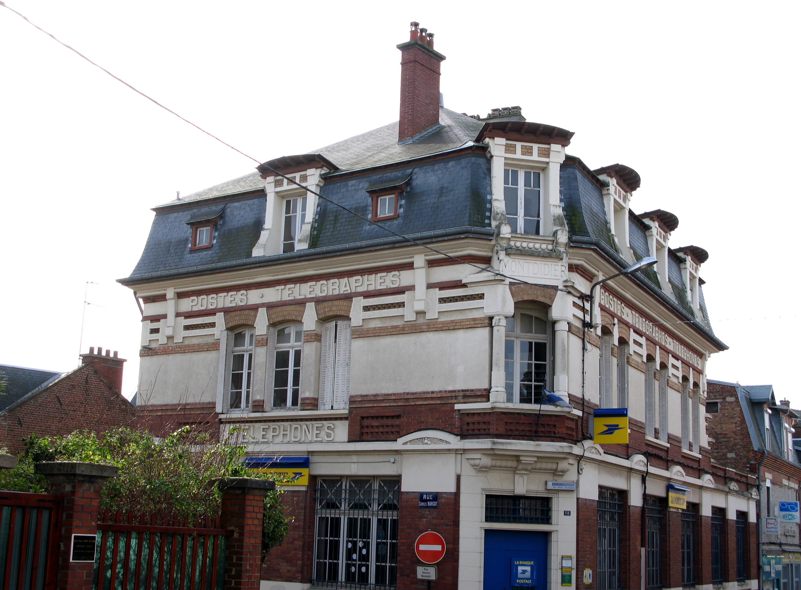 Montdidier (Somme, France) - La poste, dans la rue Albert 1er et à l'angle de la rue Charles Mangot. . .